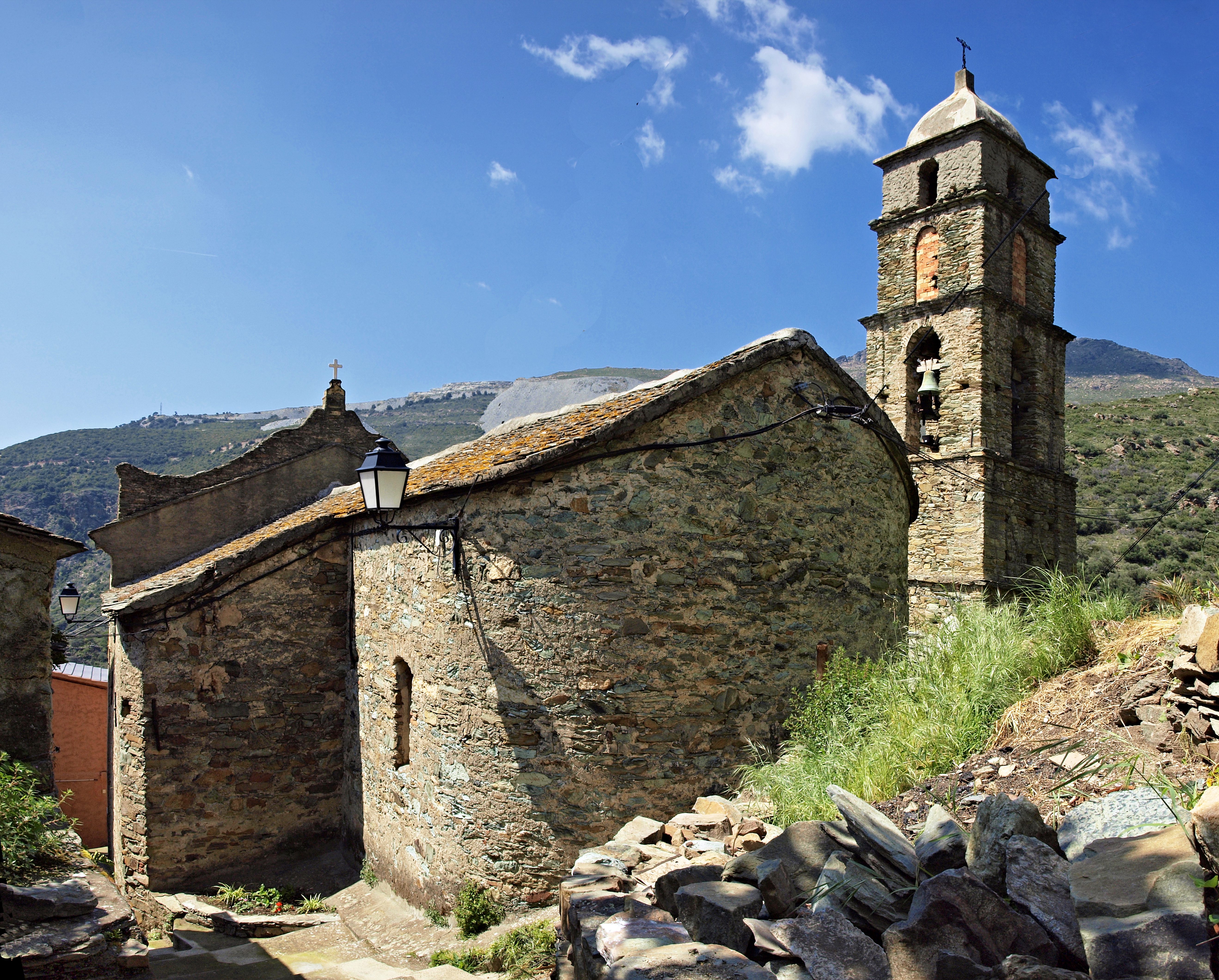 Ogliastro, Cap Corse (Corse) - Chevet de l'église de l'Annunziata. En arrière-plan, l'ancienne carrière d'amiante de Canari